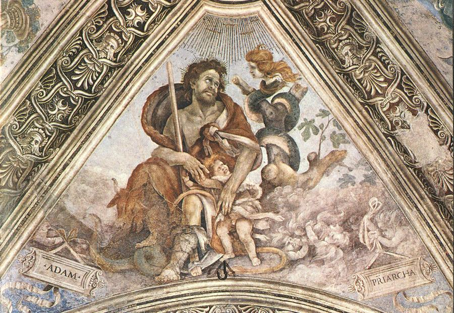 LIPPI, Filippino Adam Fresco Strozzi Chapel, Santa Maria Novella, Florence